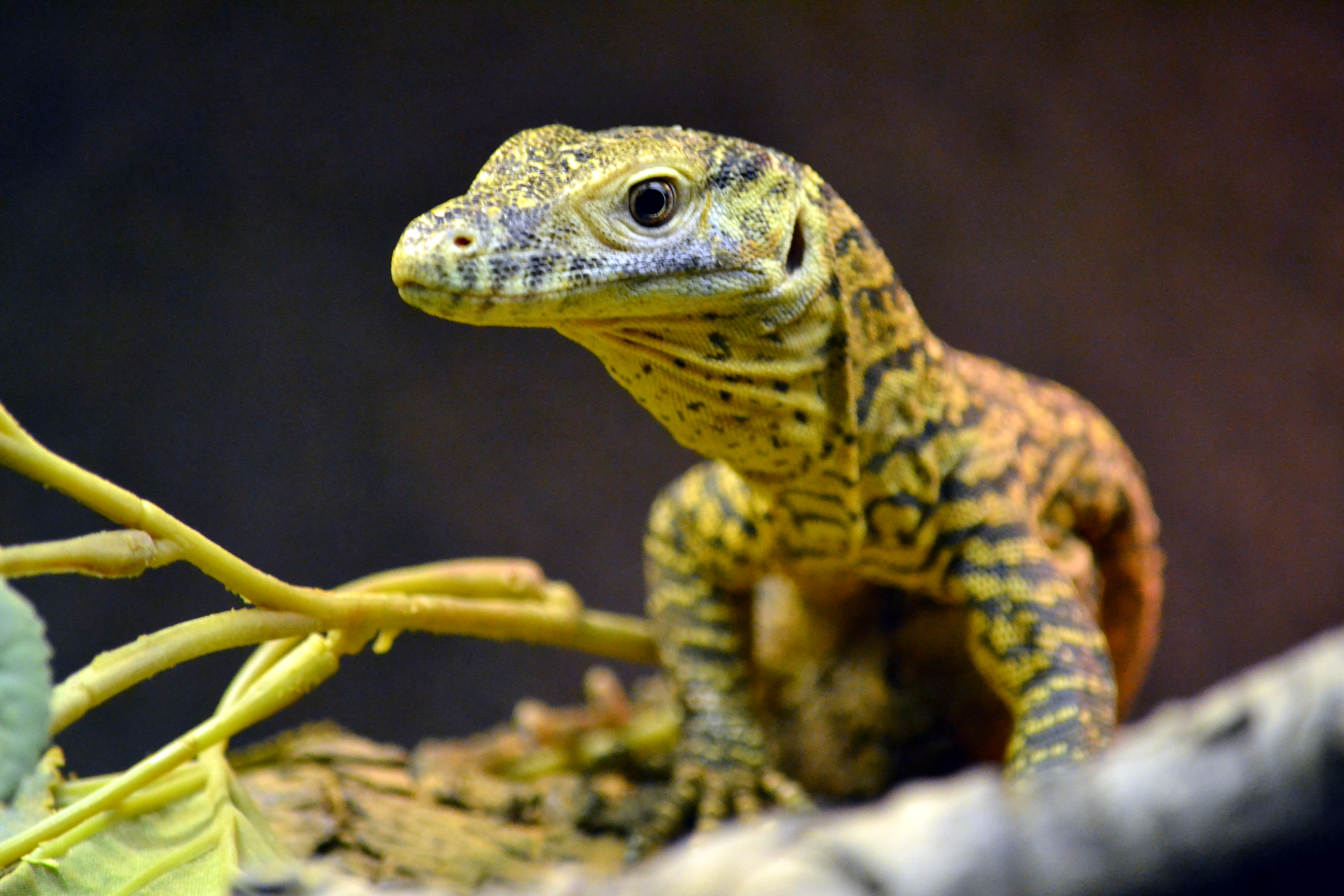 Deze foto is gemaakt in Diergaarde Blijdorp. This picture was taken at Rotterdam Zoo.